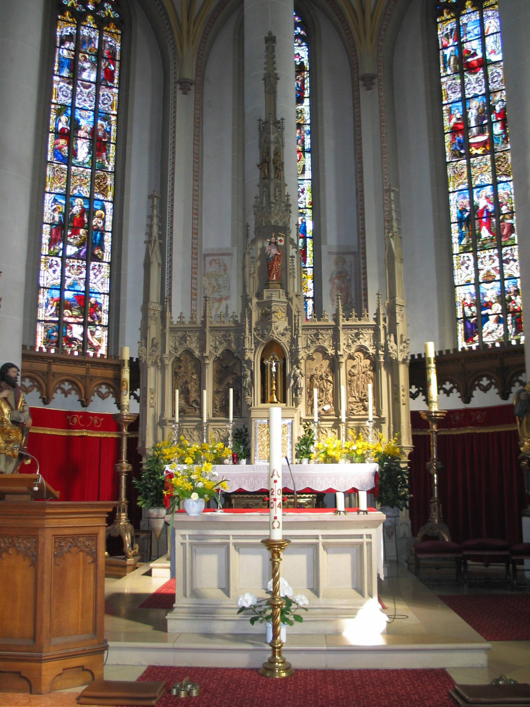 Dingolfing, Kath. Stadtpfarrkirche St. Johannes. Hochaltar.